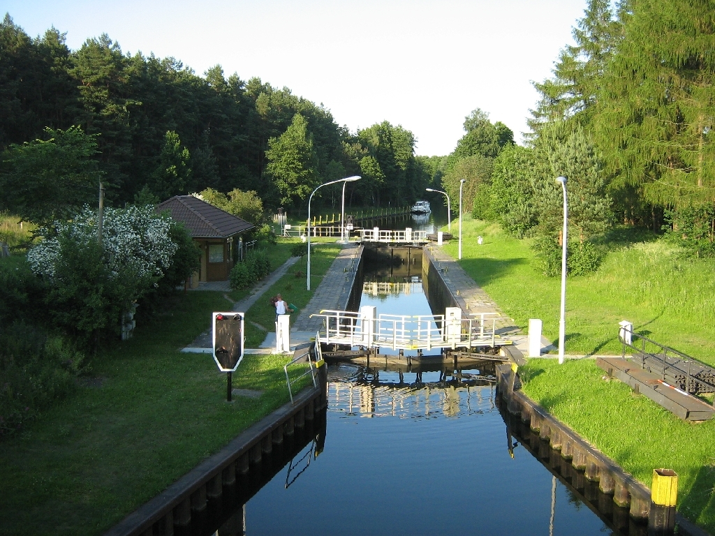 Müritz-Havel Wasserstraße bei Diemitz im Landkreis Mecklenburg-Strelitz, (Mecklenburg-Vorpommern, Germany).